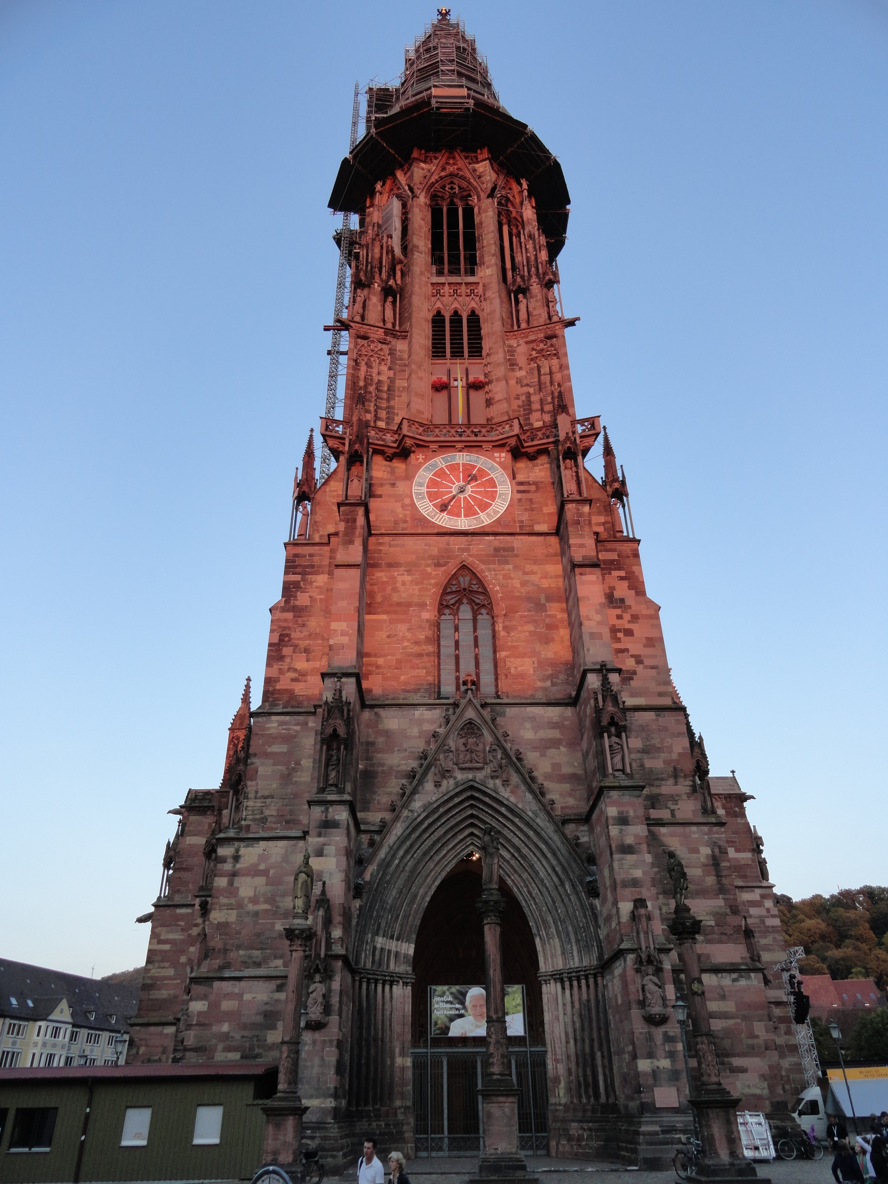 Freiburger Münster